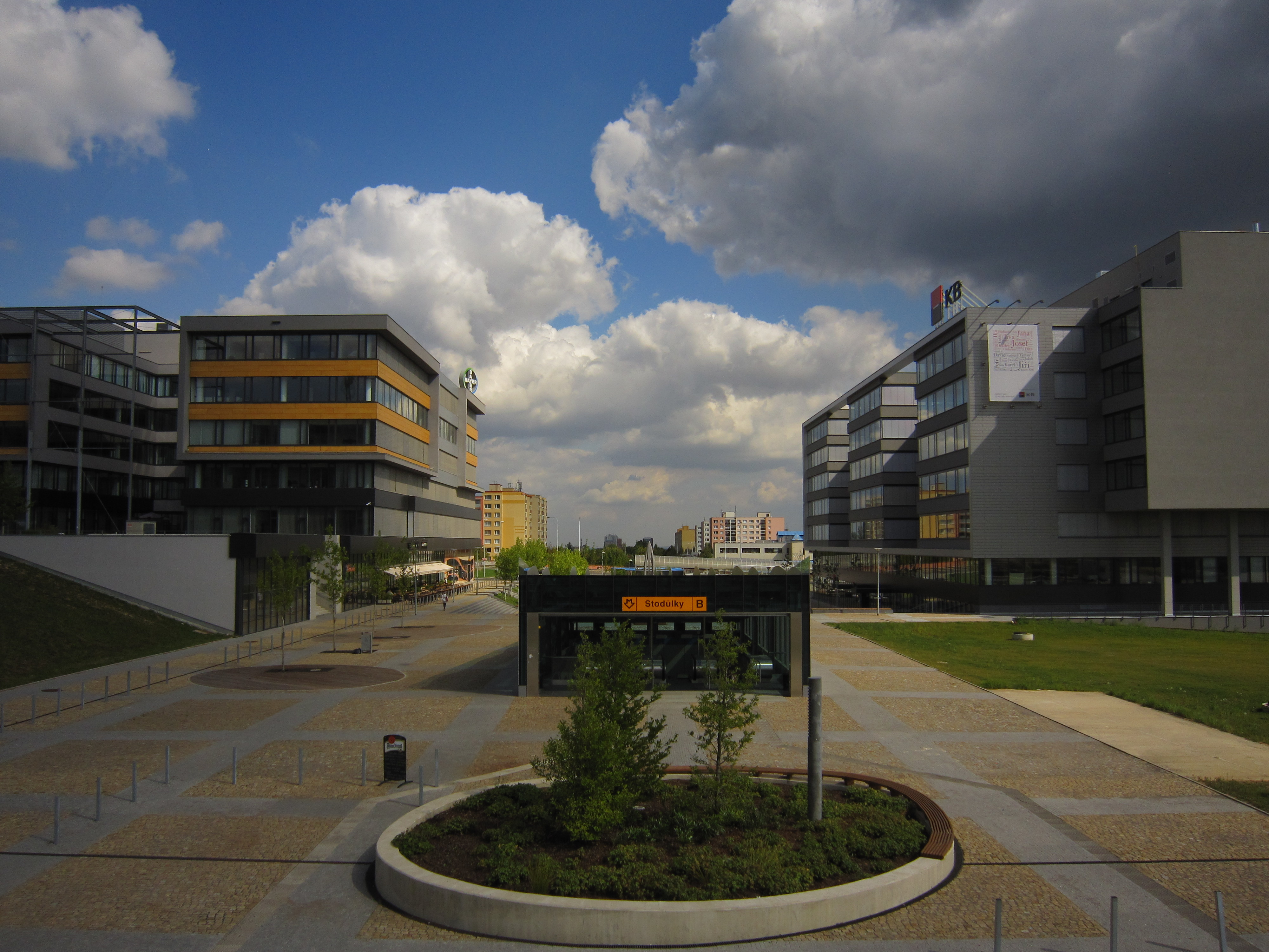 Pohled na centrální náměstí Západního Města, které již od roku 2006 postupně vzniká na území pražských Stodůlek. Zdejší rezidenti mohou již nyní využívat řadu nových služeb, které pravidelně přibývají. Příkladem je Billa, restaurace značky Pilsner Urquell Bekovka, banka, Sushi bar a řada dalších.